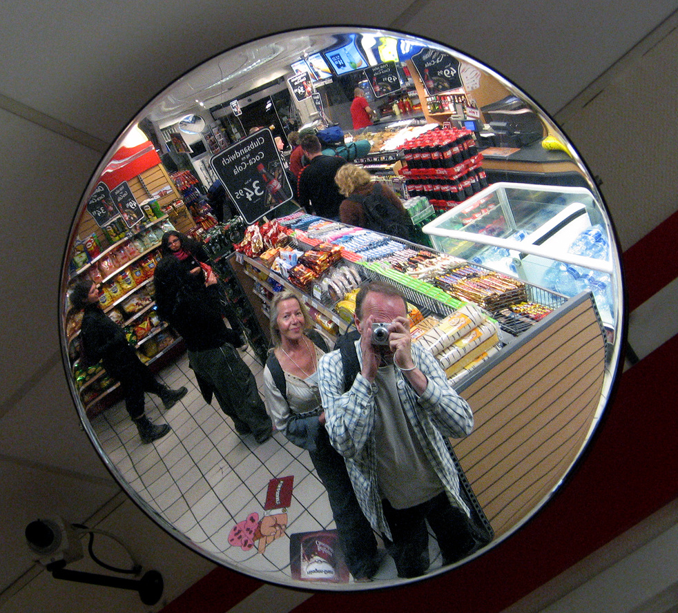 Spegelbild i övervakningsspegel. Köpenhamn 2007.